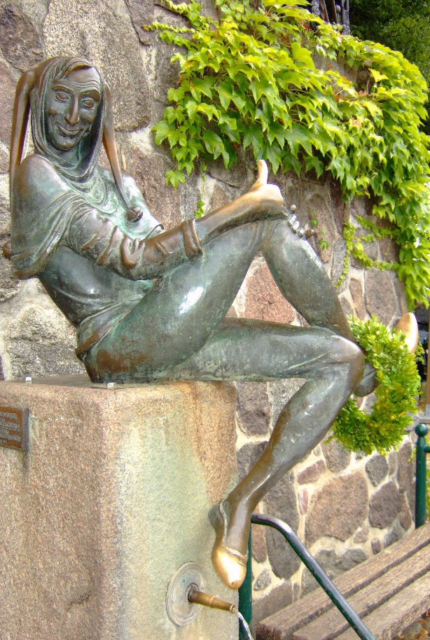 Karlheinz Goedtke: Till Eulenspiegel (1951) Material: Bronze Standort: Mölln - Rathausplatz Aufnahme: 28.7.2006 Url